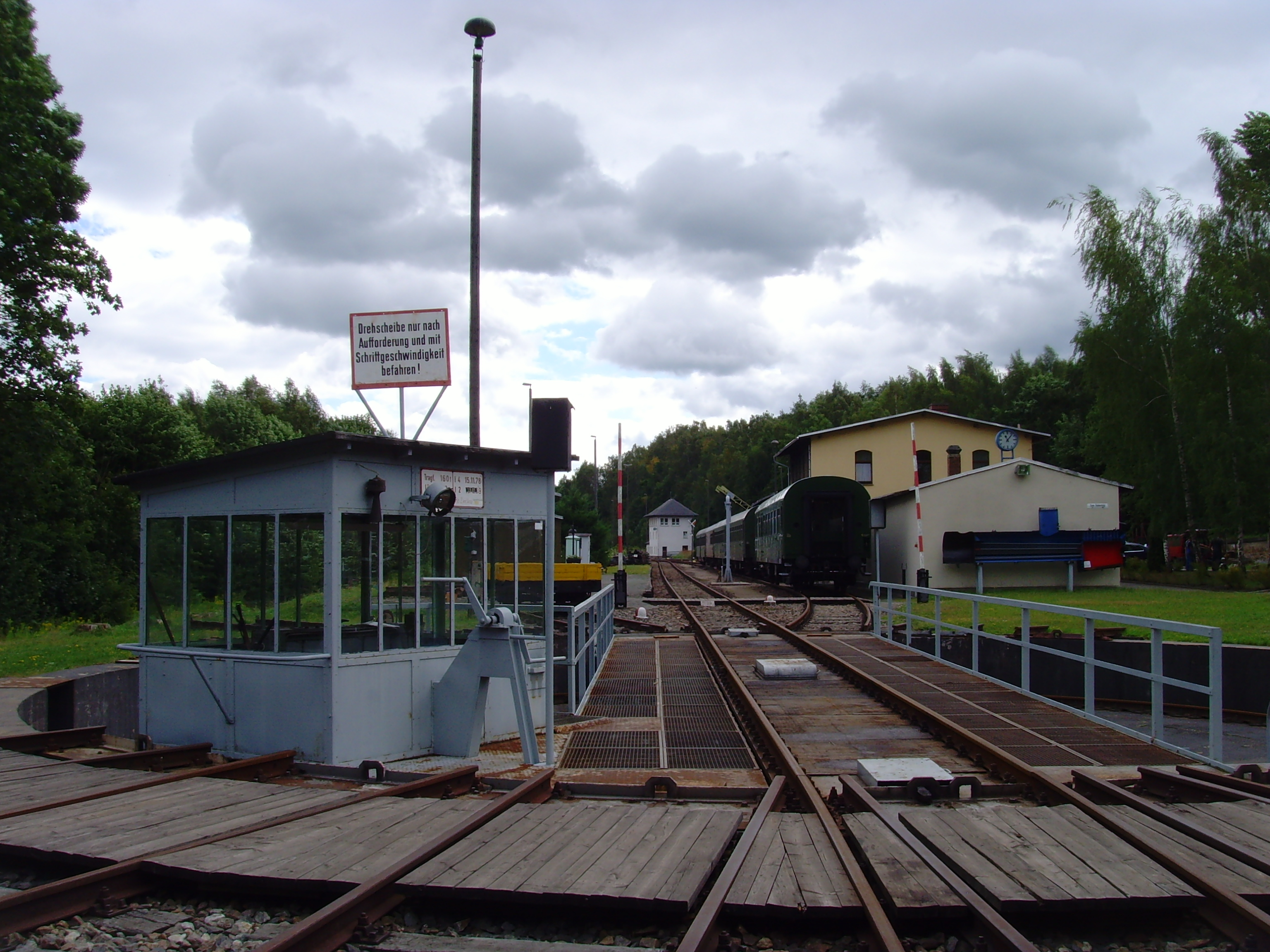 055 Eisenbahnmuseum Schwarzenberg